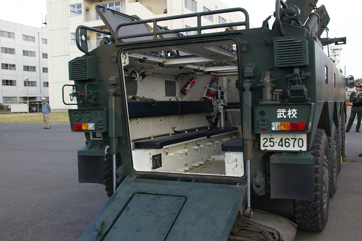 JGSDF Type96 APC.In Camp Matsudo,Japan. ja:96式装輪装甲車 2007年11月18日、松戸駐屯地で撮影。